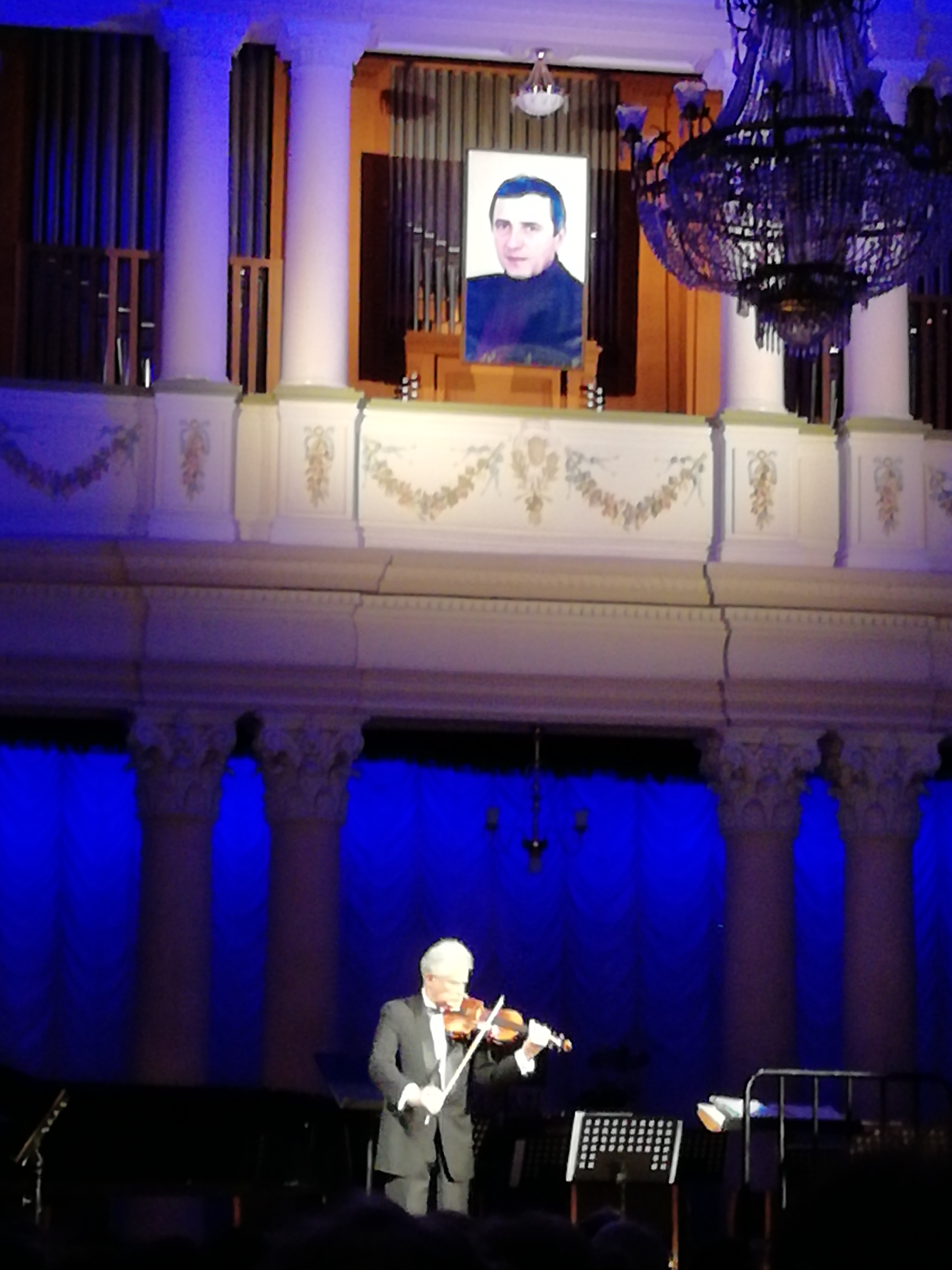 фото з концерту до 75-річчя Івана Карабиця (Національна філармонія України, 17.01.2020)